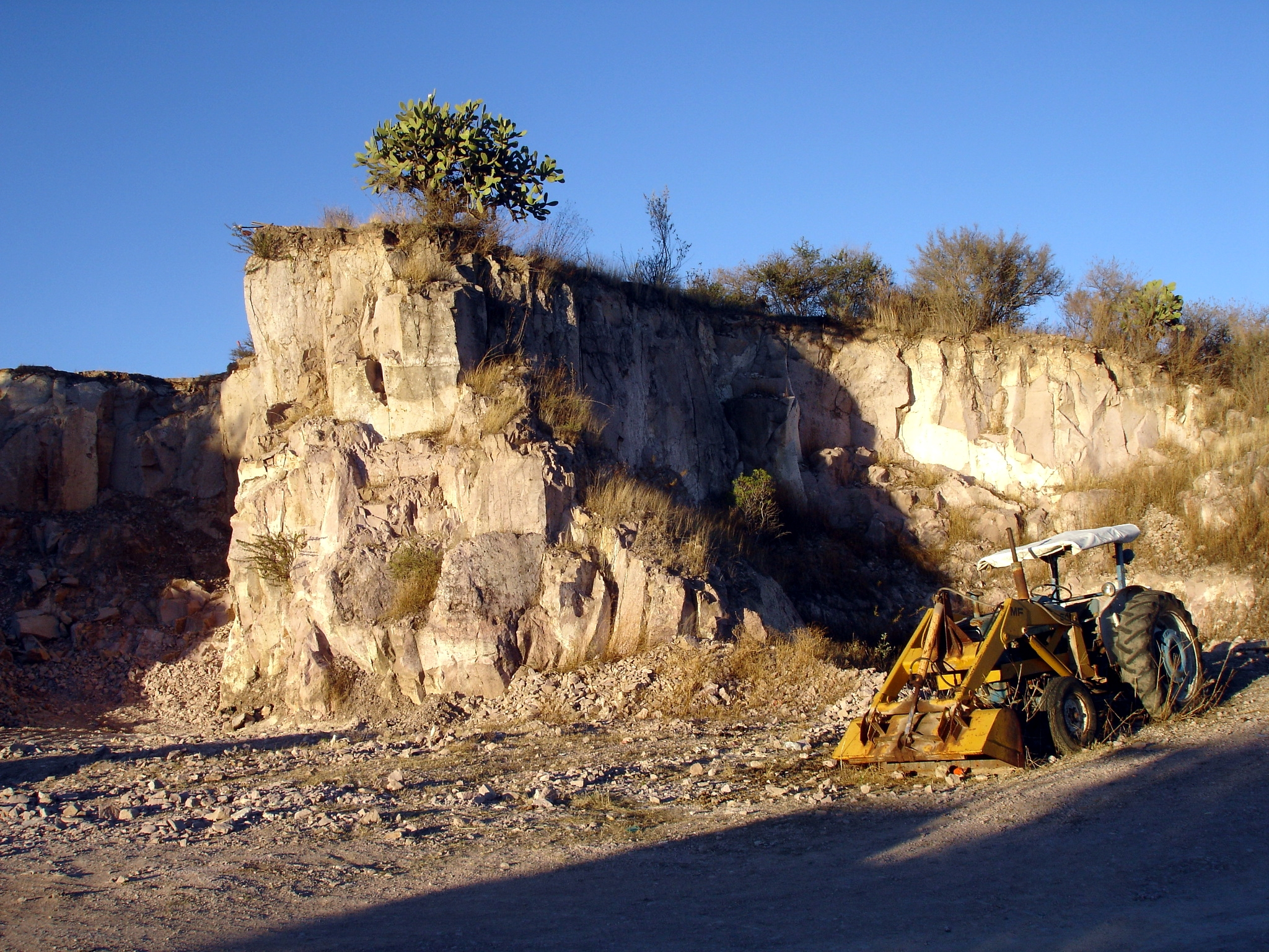 mina de cantera rosa en san miguel el alto